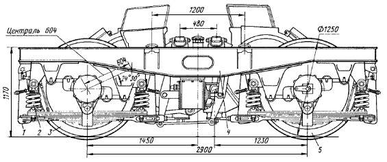 Схема крайней тележки электровоза ВЛ85